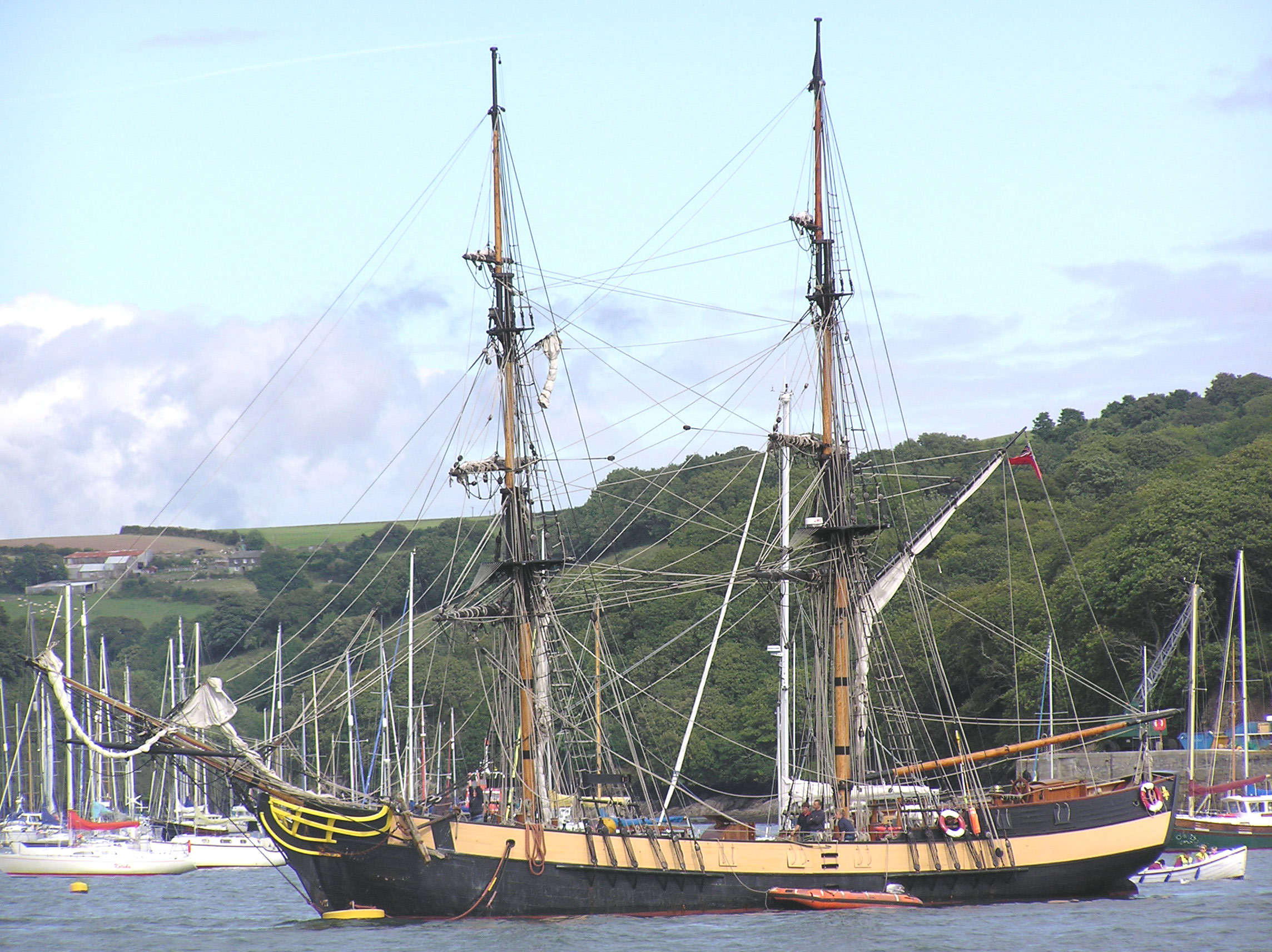 Description : Brick au mouillage à Fowey Lieu : Fowey, Royaume Uni Date : 2005 Auteur : Pline Photo personnelle